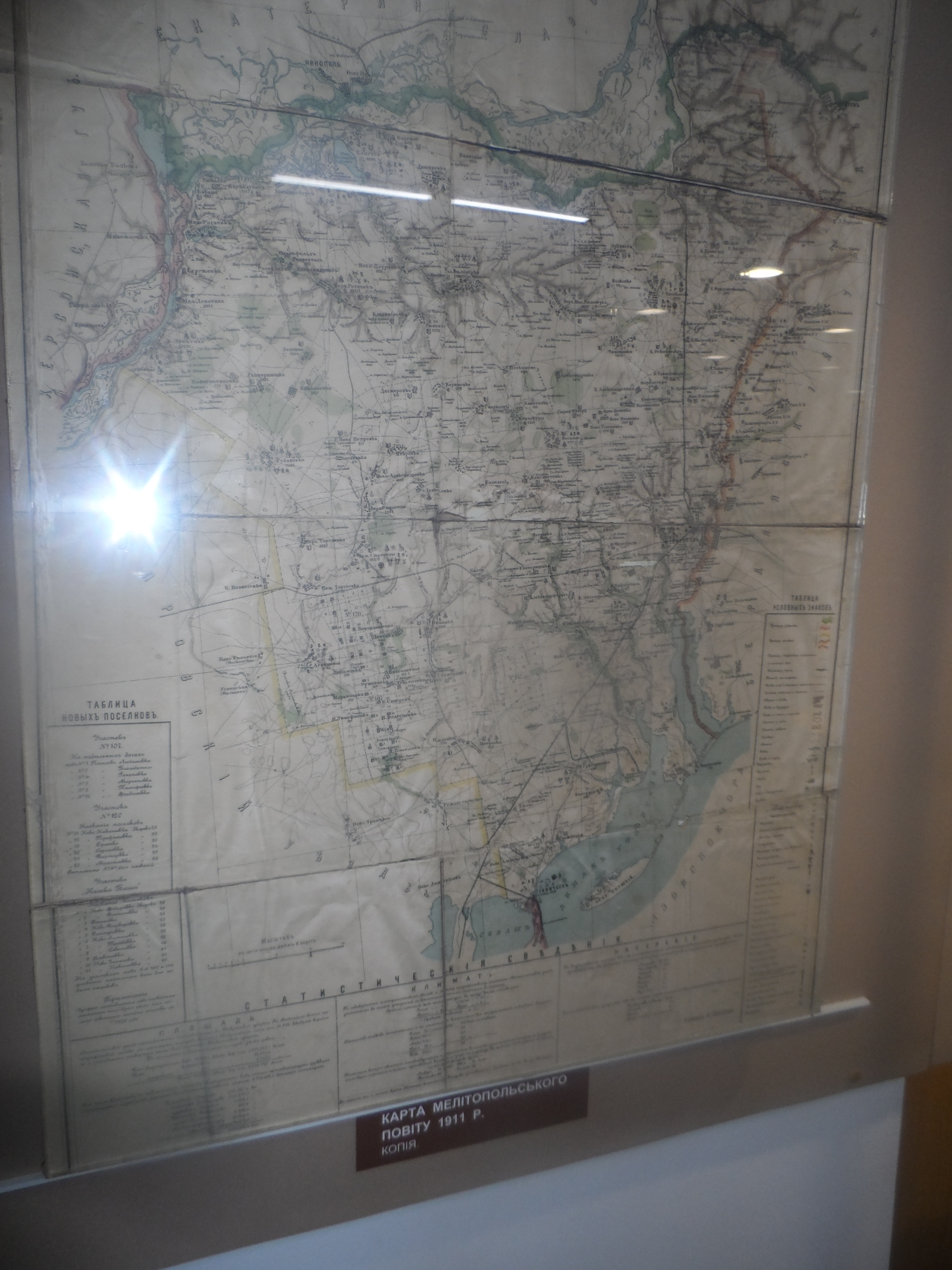 1911 год